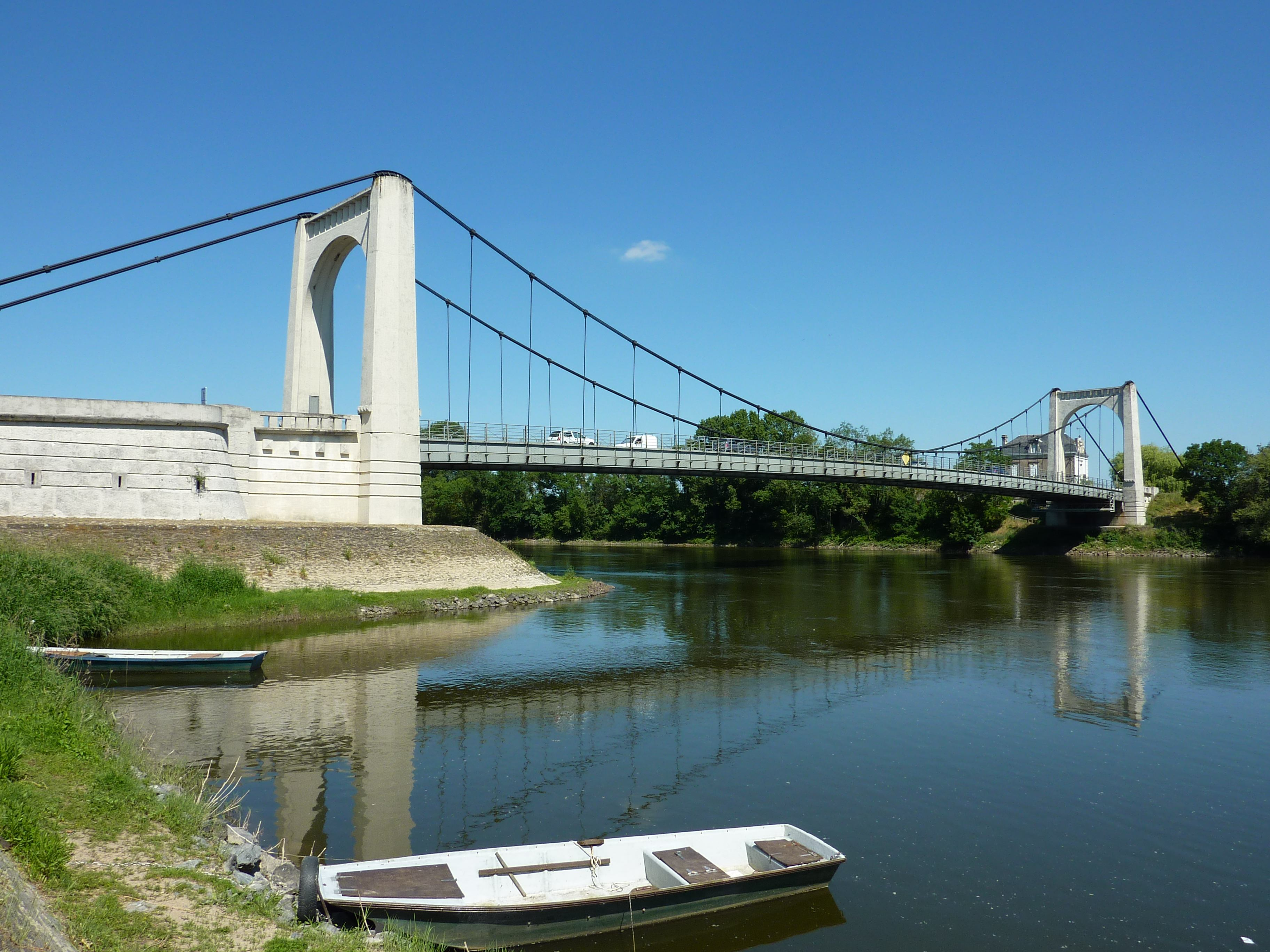 Pont de Chalonnes-sur-Loire (Maine-et-Loire, France), reliant la ville de Chalonnes-sur-Loire à l'Île de Chalonnes.